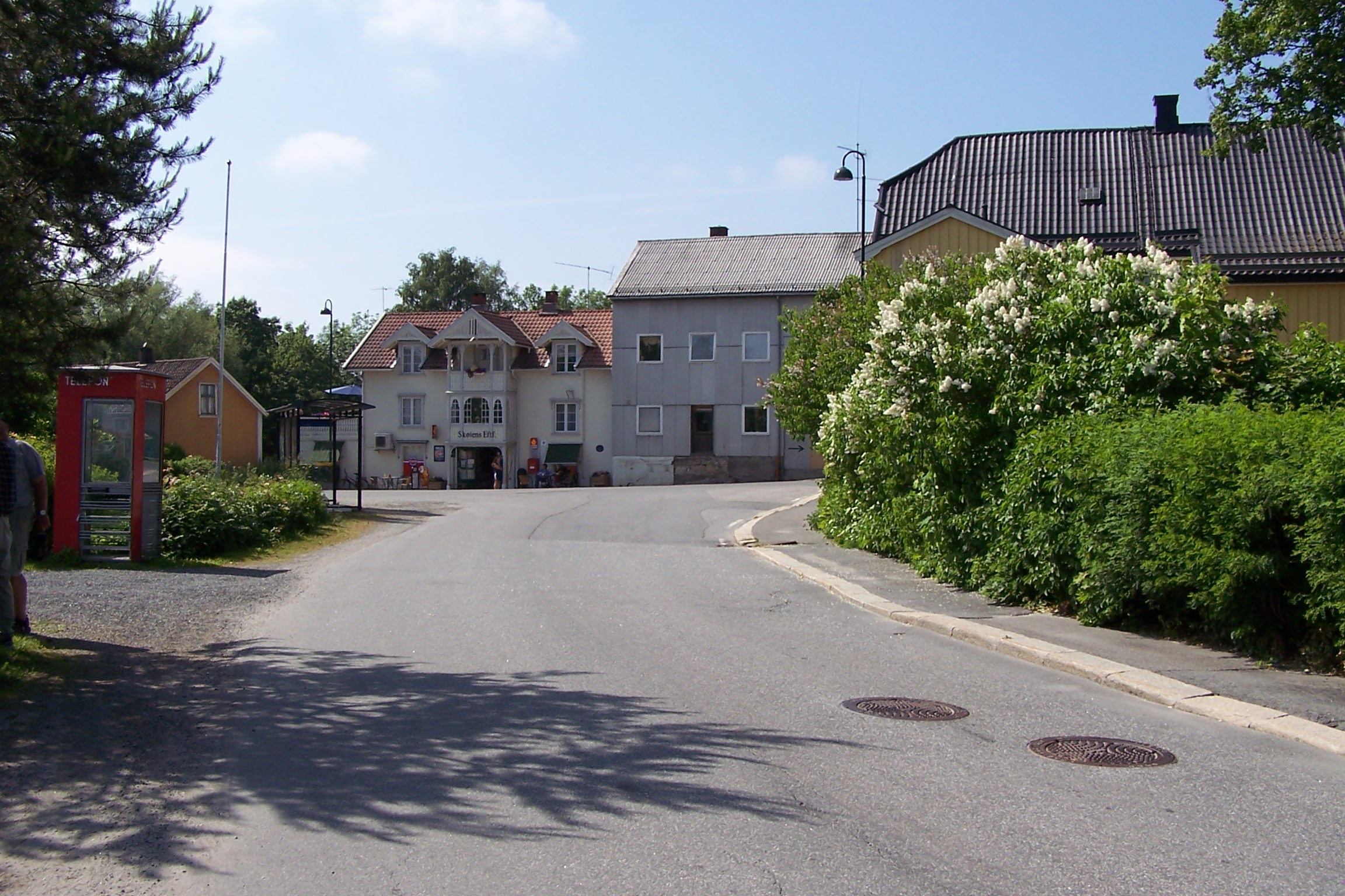 Hølen, torget (market square)